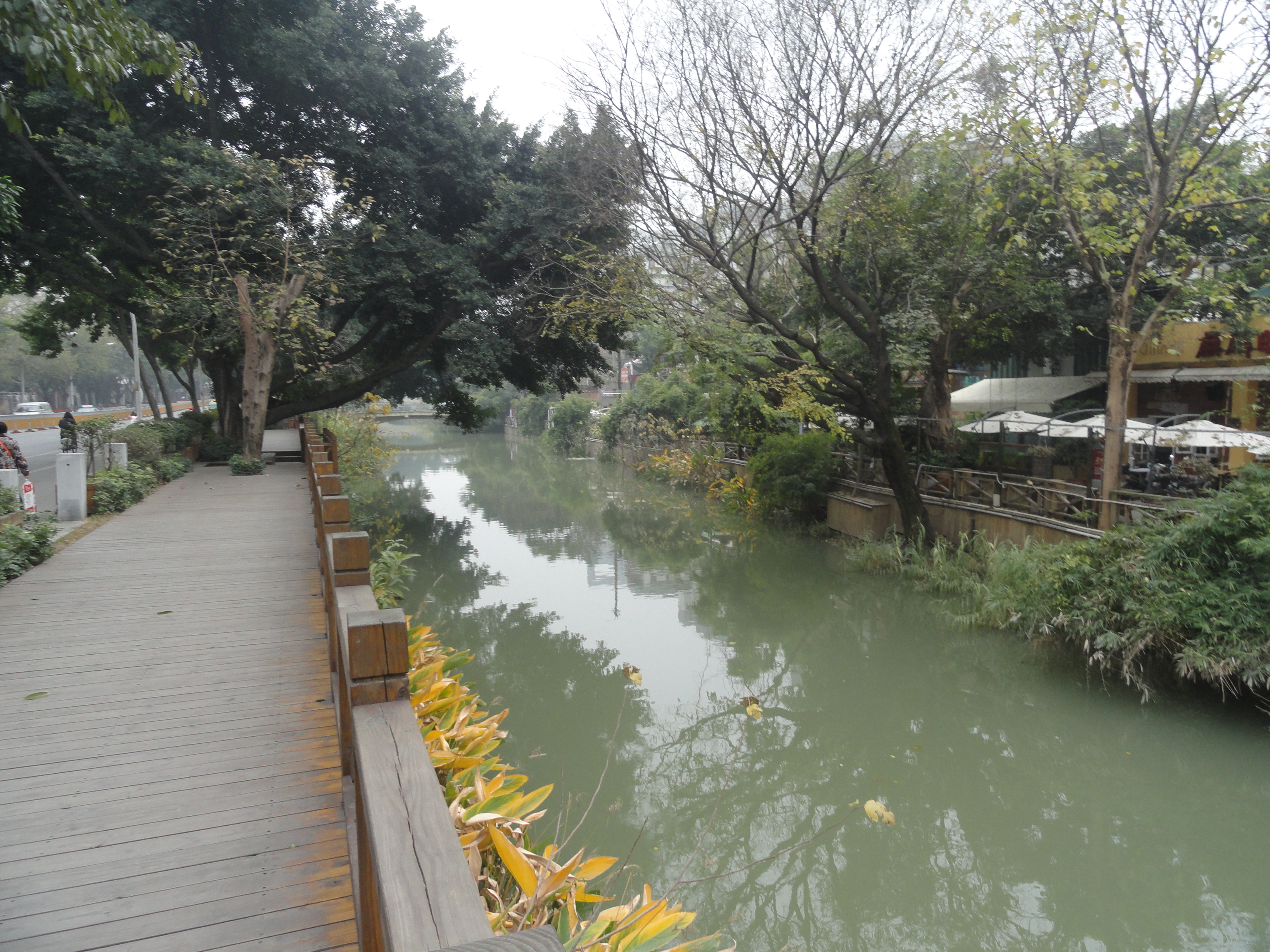 中文（中国大陆）: 在白马路上拍摄福州白马河